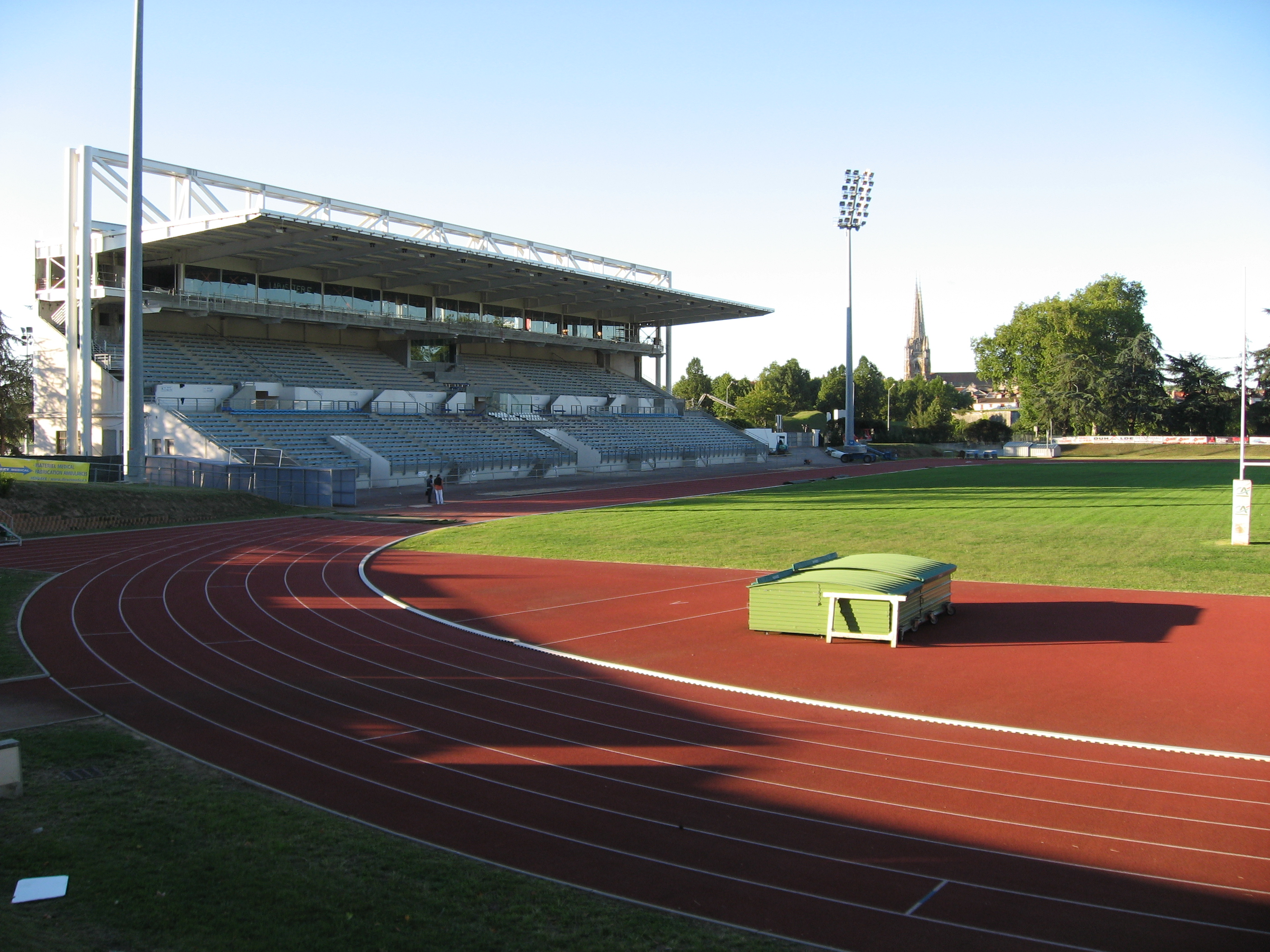 Tribune d'Honneur, stade Jean Dauger, France